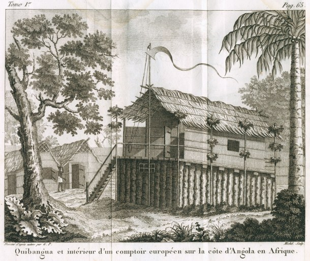 Quibangua et intérieur d'un comptoir européen sur la côte d'Angola en Afrique. Dessin d'après nature de Louis Ohier de Grandpré, gravé par Nicolas Courbe.Gravure en taille-douce. Lieu de conservation : Centre des Archives d'Outre-Mer site web Contact Cpyright : © Centre des Archives d'Outre-Mer Référence de l'image : CAOM/BIB.AOM.Res 46683